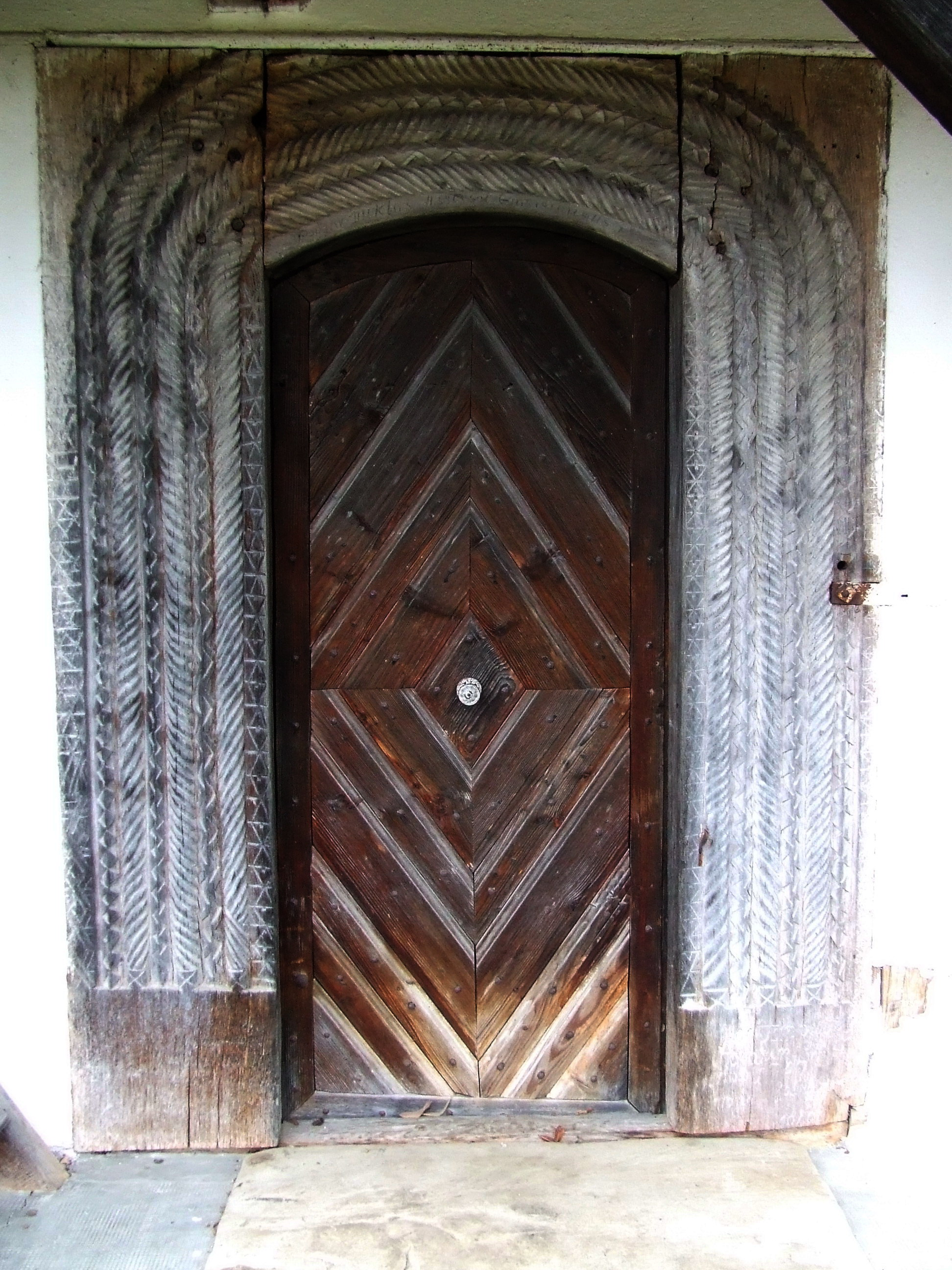 Biserica de lemn din Peştiş, judeţul Bihor.